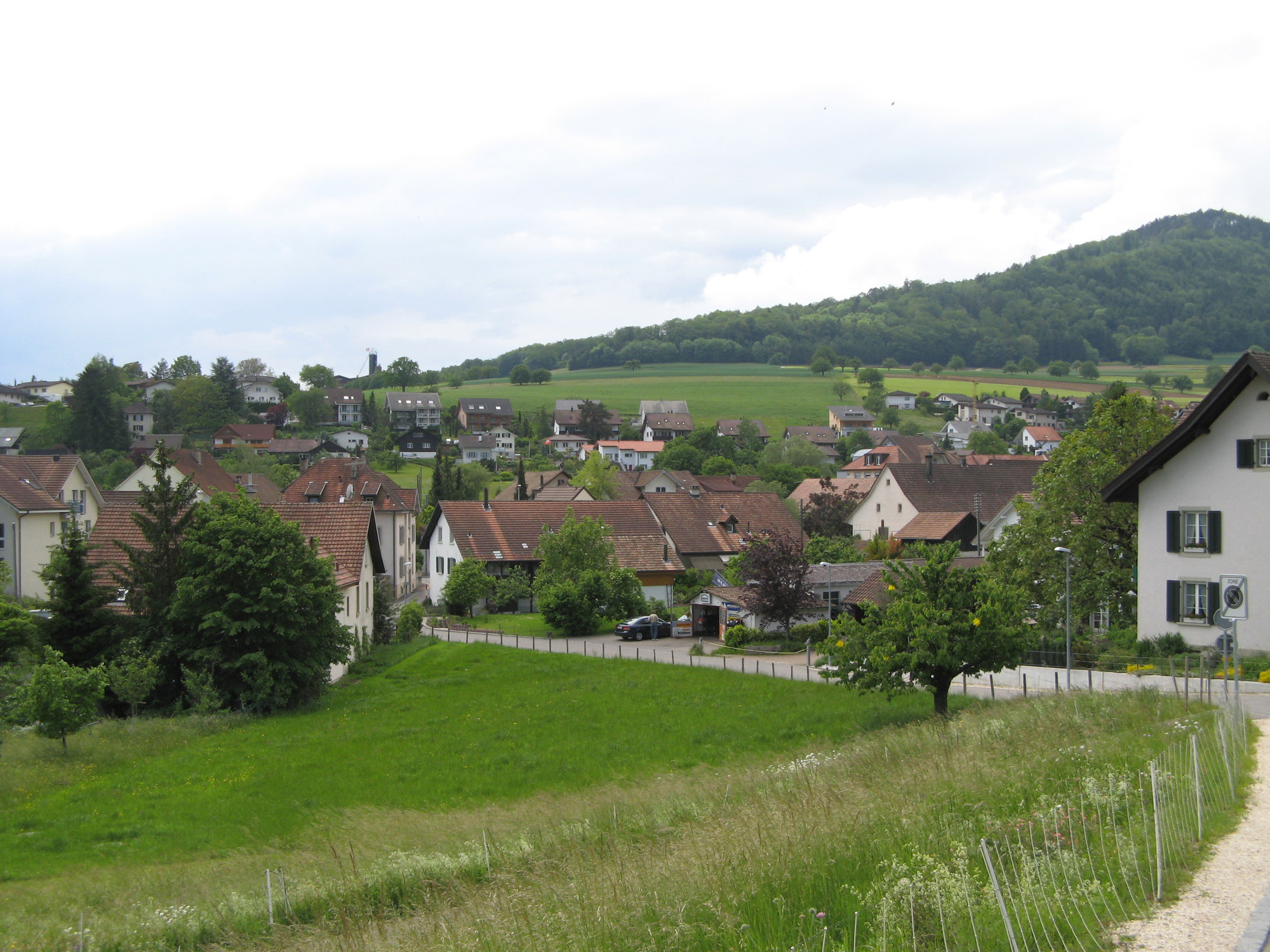 Ansicht von Erlinsbach, vorne der aargauische, hinten der solothurnische Teil